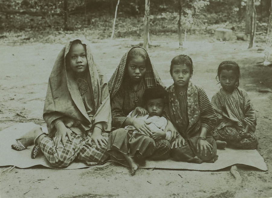 Foto's vastleggen/overdragen/visualiseren van gegevens foto's groepsportretten